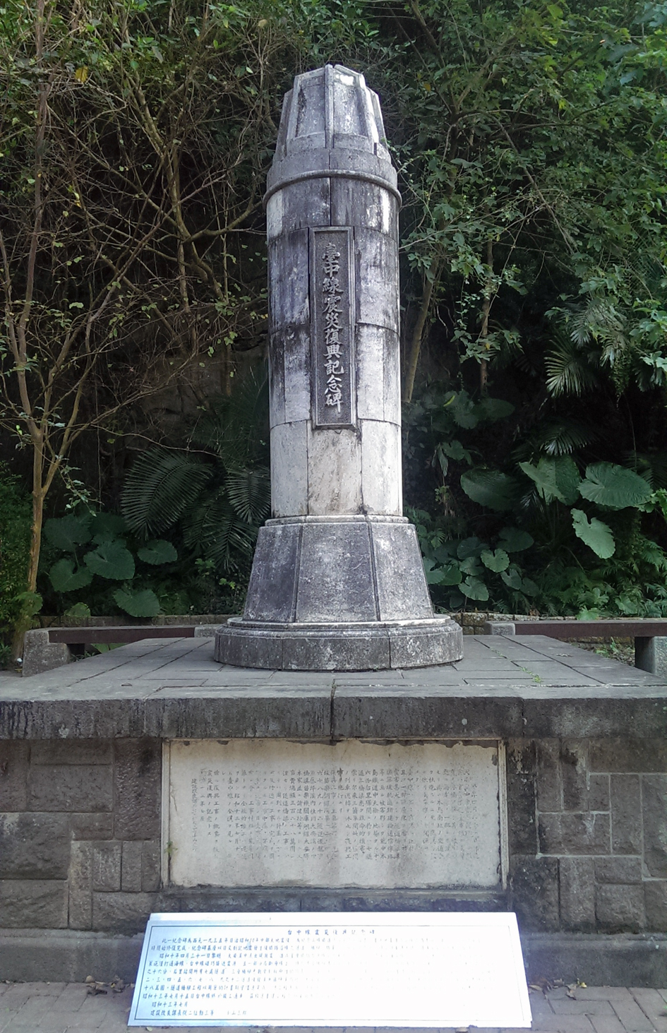 臺中線震災復興記念碑